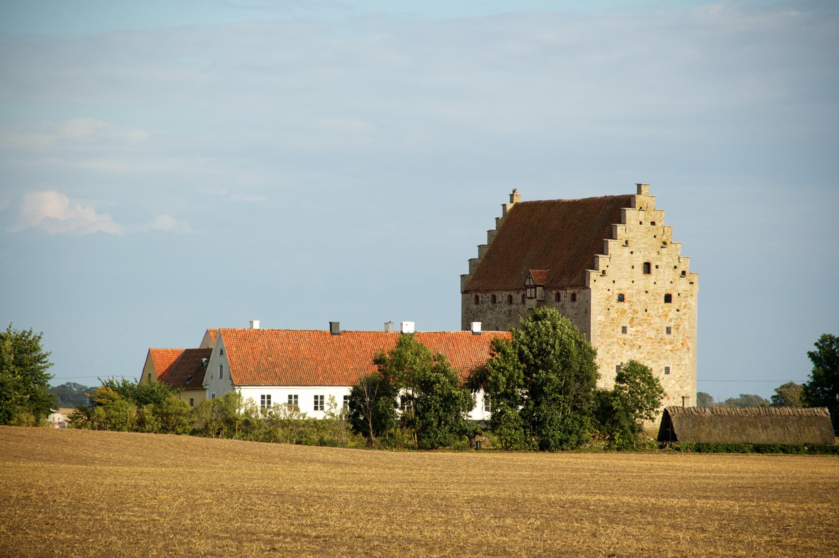 Glimmingehus